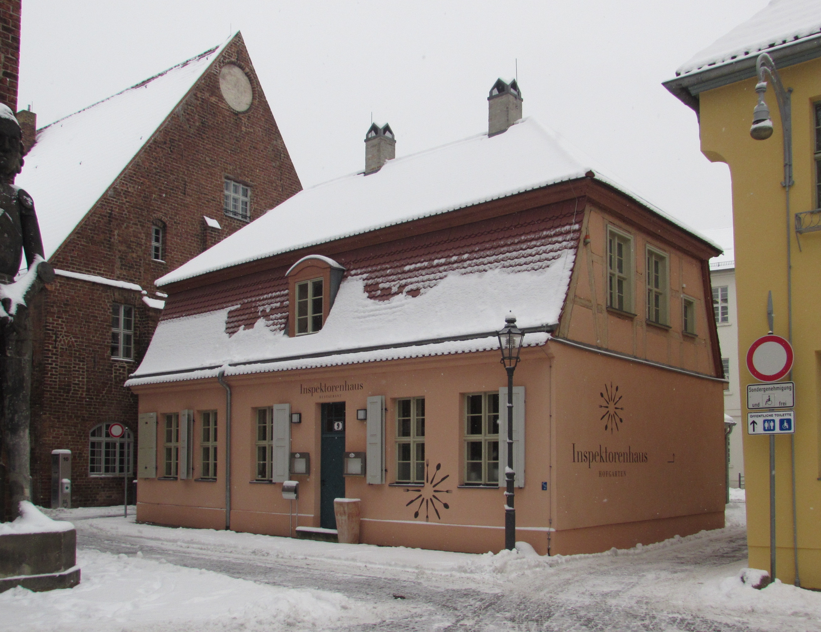 inspektorhaus, brandenburg, altstädtischer markt